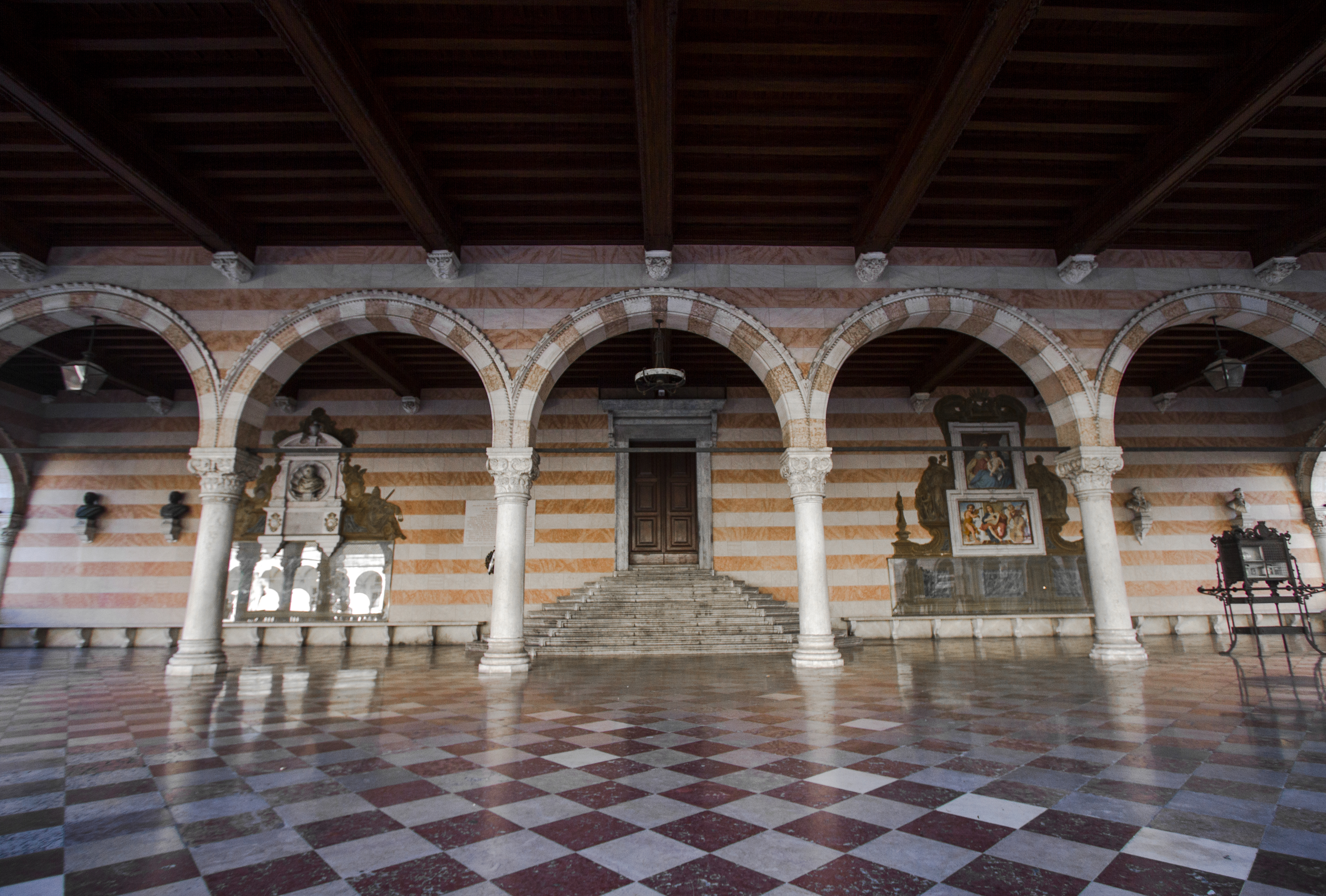 Consiglio Comunale, scattata a Udine